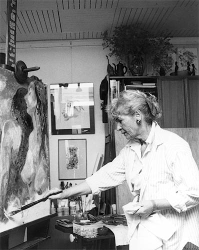 Ruth Baumgarte in ihrem Atelier